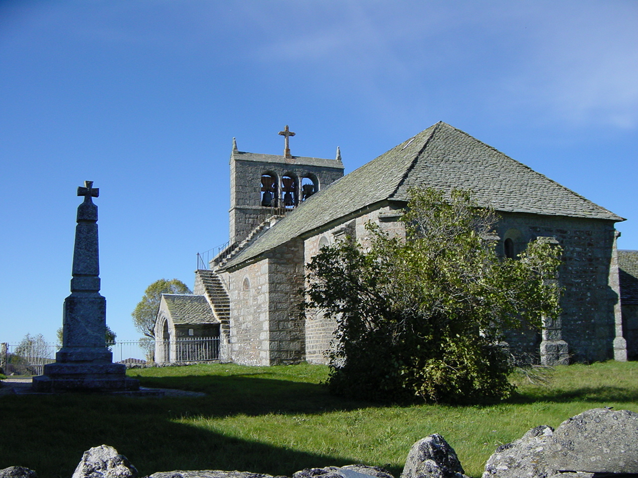 L'église de La Trinitat